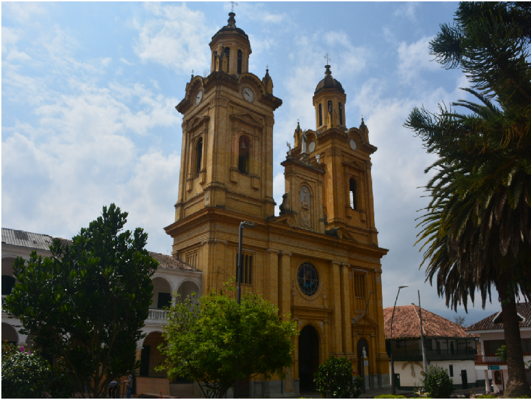 Principal Iglesia Católica de Jenesano